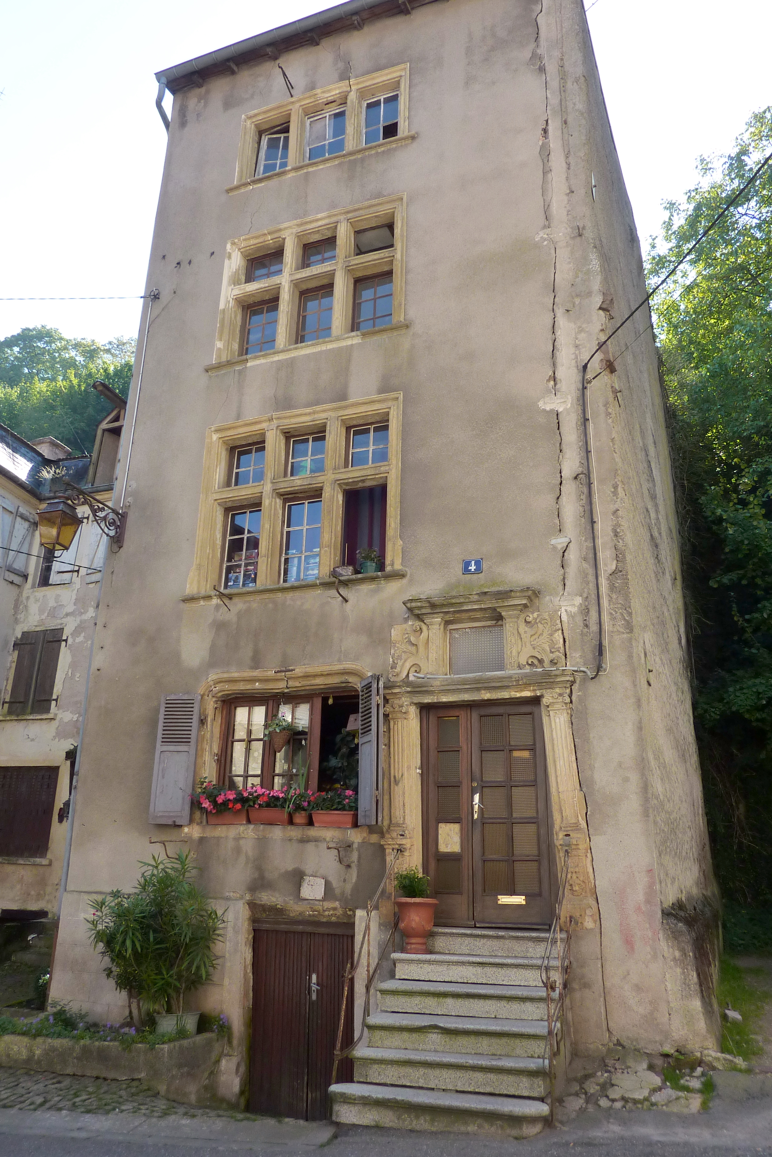 Haus (4, rue de la Tour de L'Horloge) in Sierck-les-Bains (siehe [1])